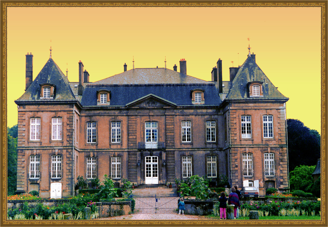 Construit par Robert de Cotte en 1714 sur l'emplacement d'une forteresse féodale dont subsistent les douves.